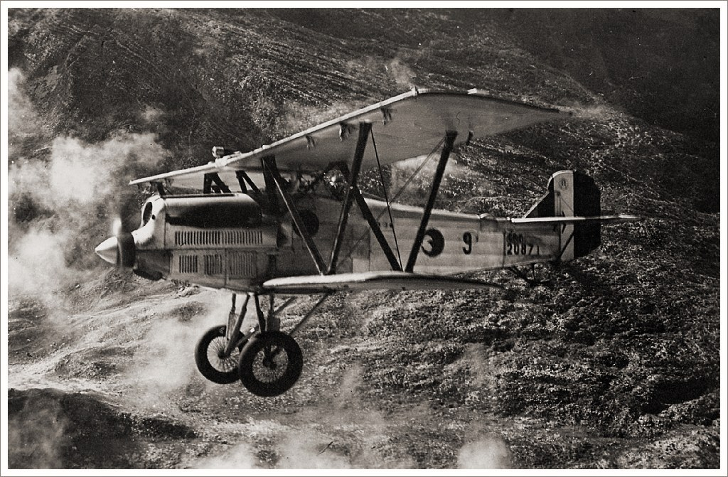 Un Fiat C.R.20 in volo. Categoria:Immagini di aeroplani